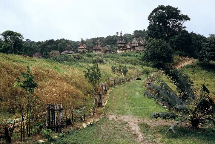 Chailoro--Tutuala.Estas casas já não existem pois foram destruídas durante a ocupação indonésia